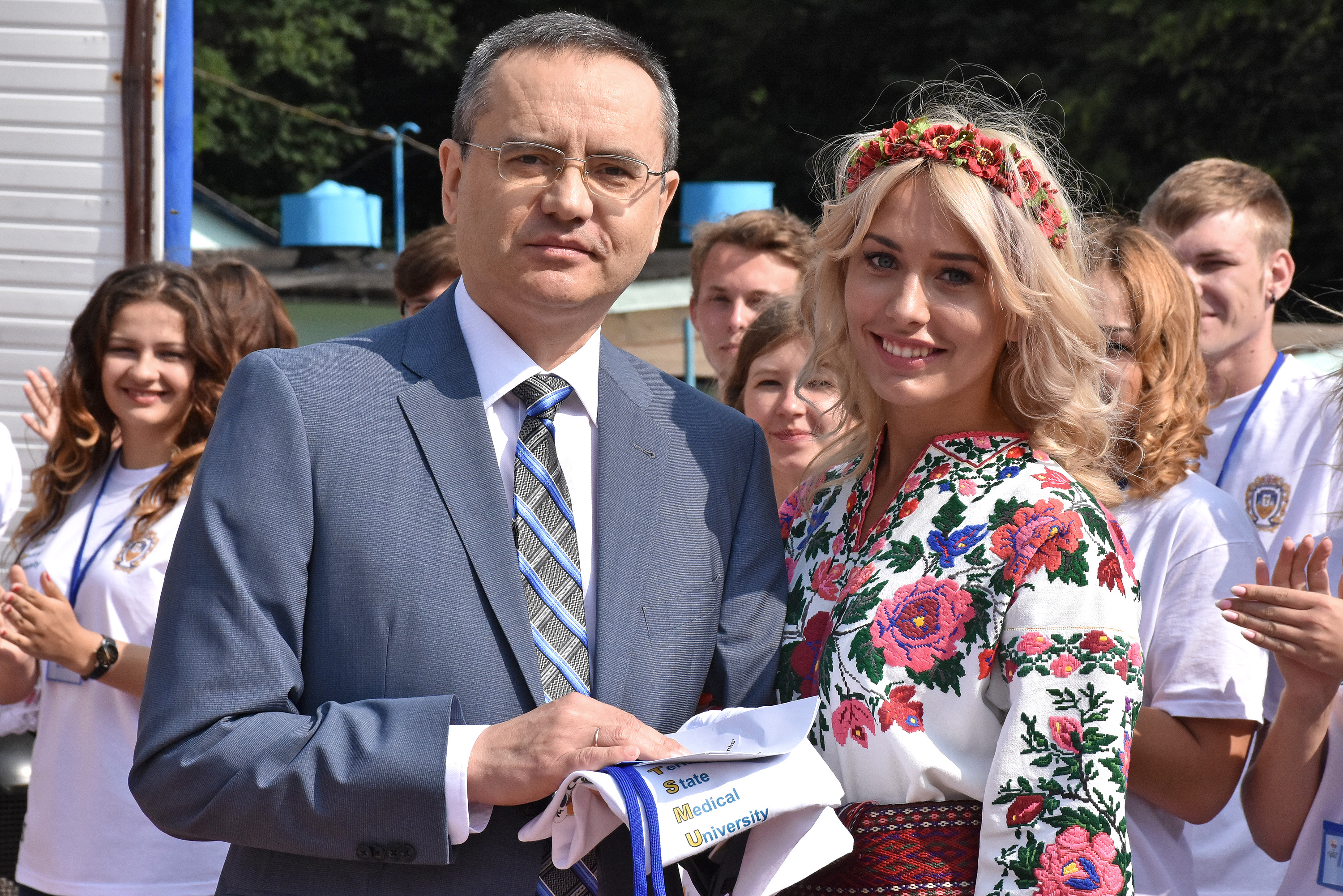 XI Літні міжнародні студентські школи в НОК «Червона калина» Тернопільського державного медичного університету імені І. Я. Горбачевського. Ректор ТДМУ професор Михайло Корда.